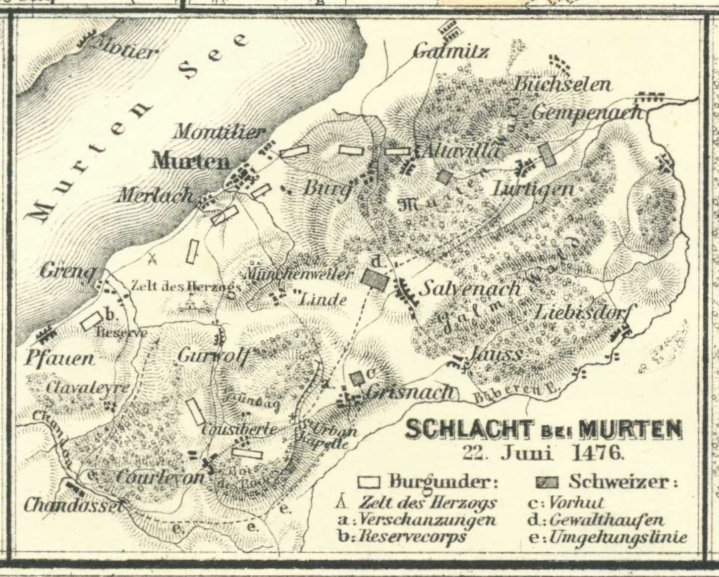 Schlacht bei Murten 22. Juni 1476